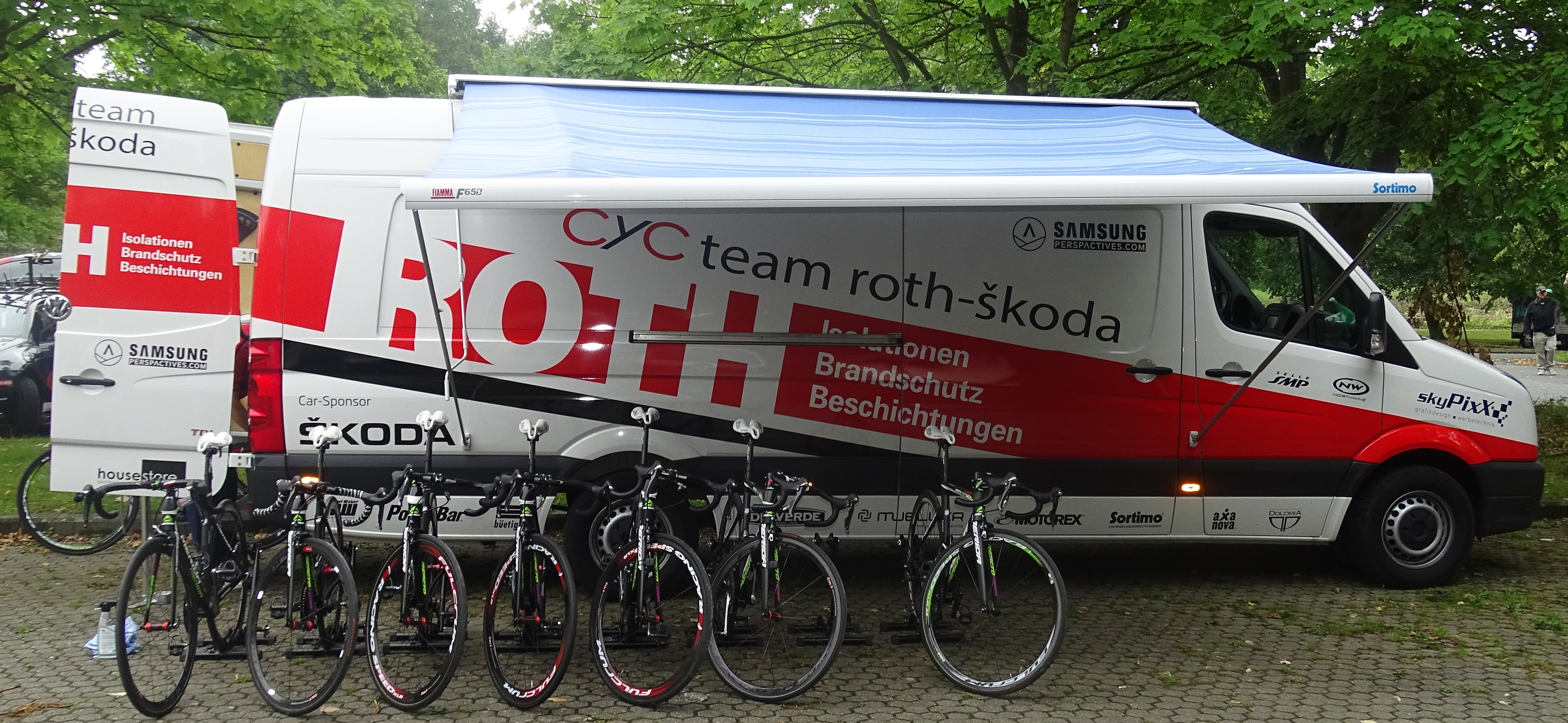 Reportage réalisé le mardi 18 août à l'occasion du départ et de l'arrivée du Grand Prix de la ville de Zottegem 2015 à Zottegem, Belgique.